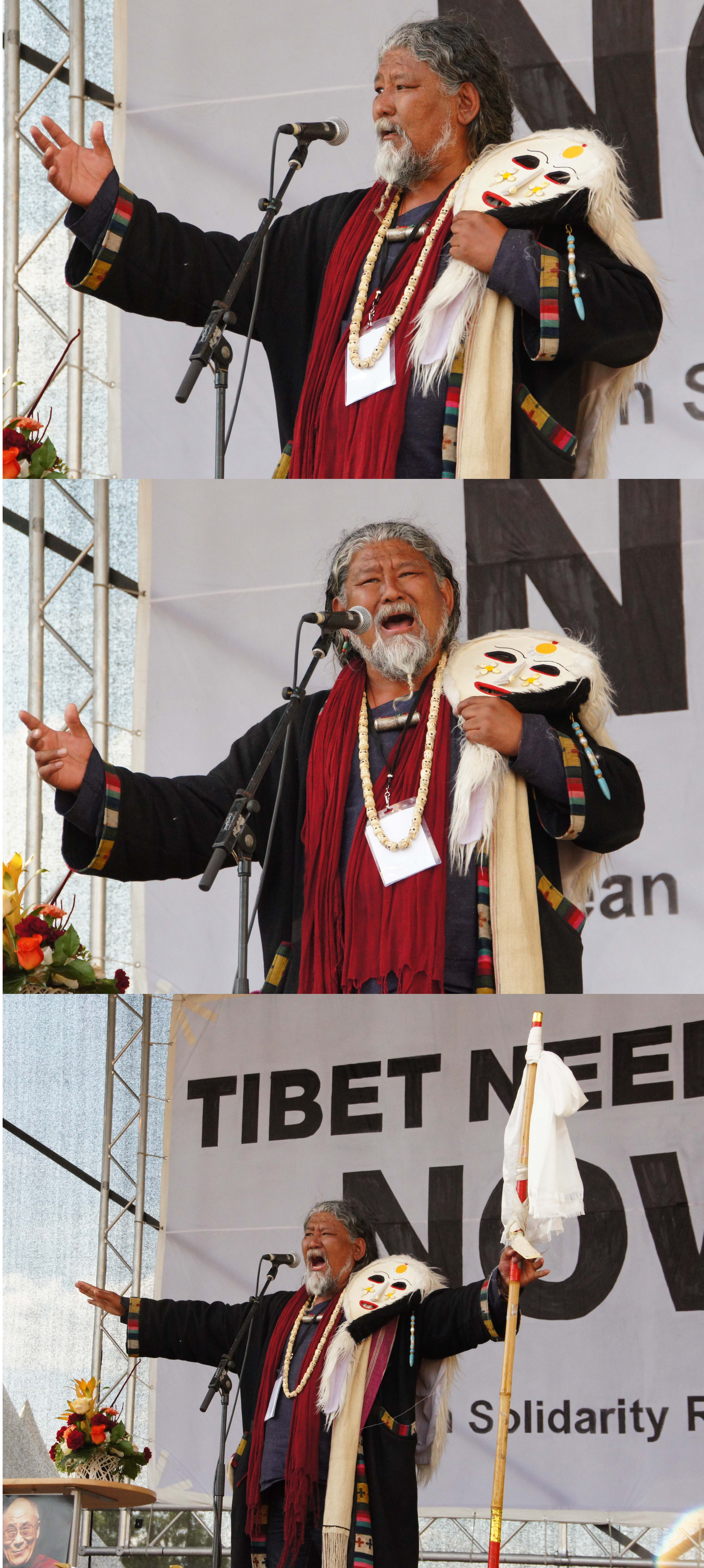 Tibetan musician Loten Namling